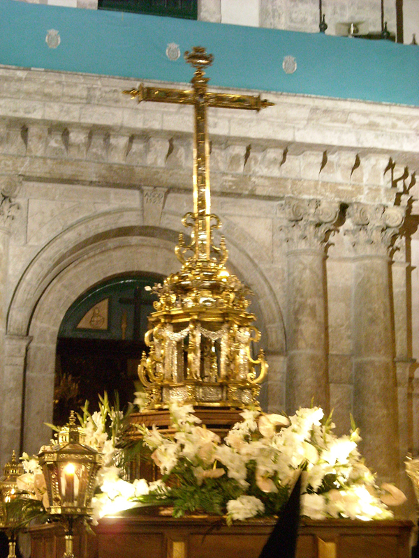 Relicario del Lignum Crucis de Valladolid (1500-1550), Cofradía de la Santa Vera Cruz, Semana Santa de Valladolid